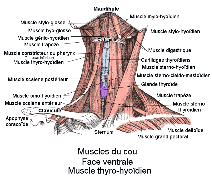 Muscle thyro-hyoïdien. Vue antérieure. Anatomie humaine